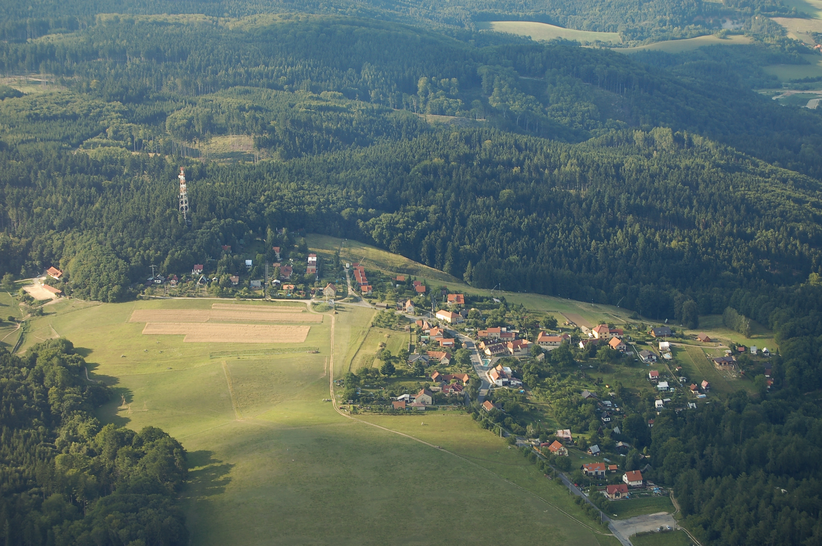 Blansko - místní část Hořice